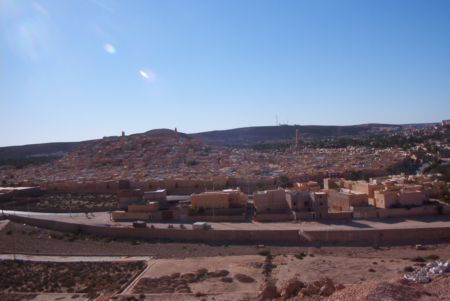 vue générale de Ghardaïa